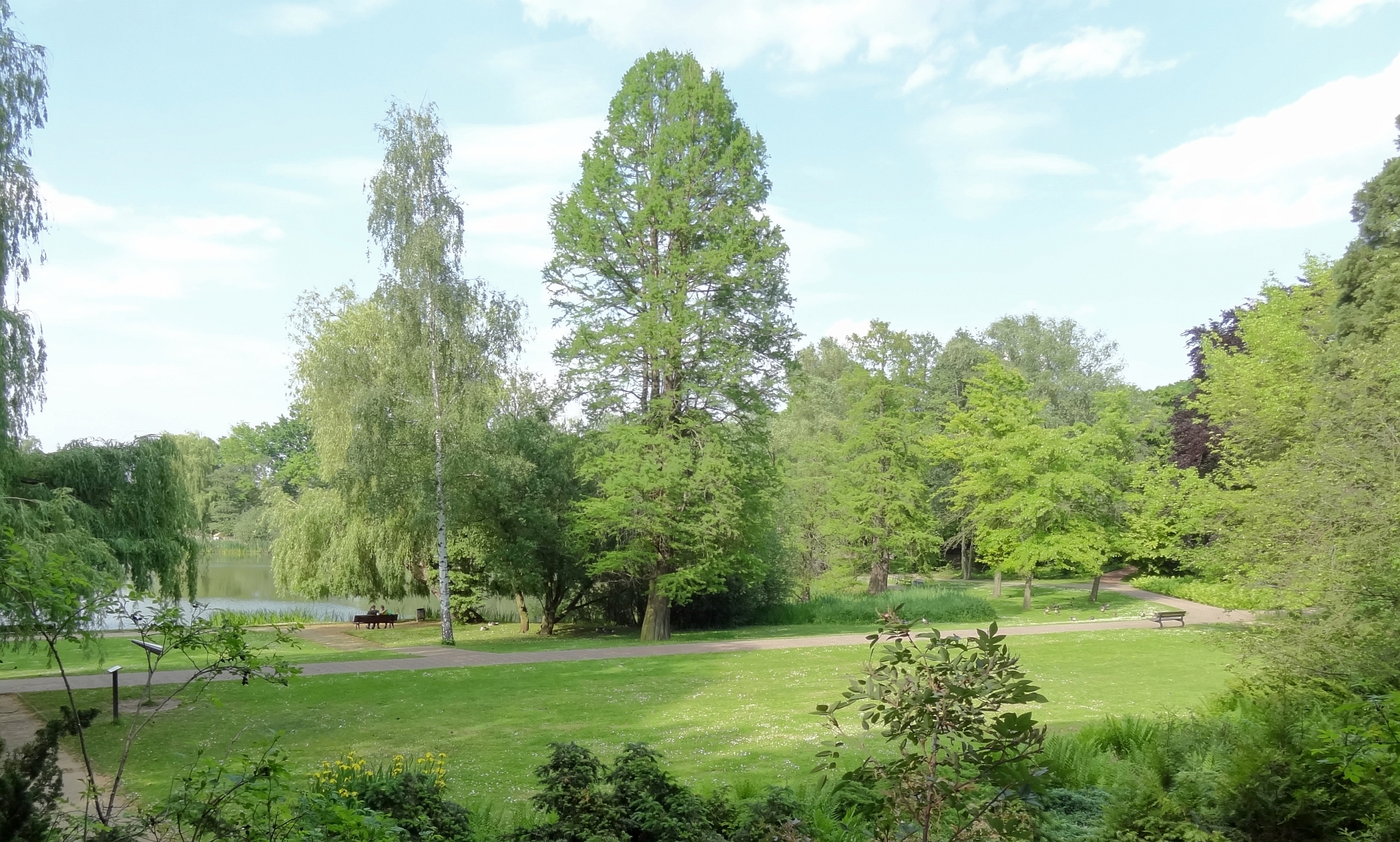 Ufer des Dowesee im Schul- und Bürgergarten Braunschweig